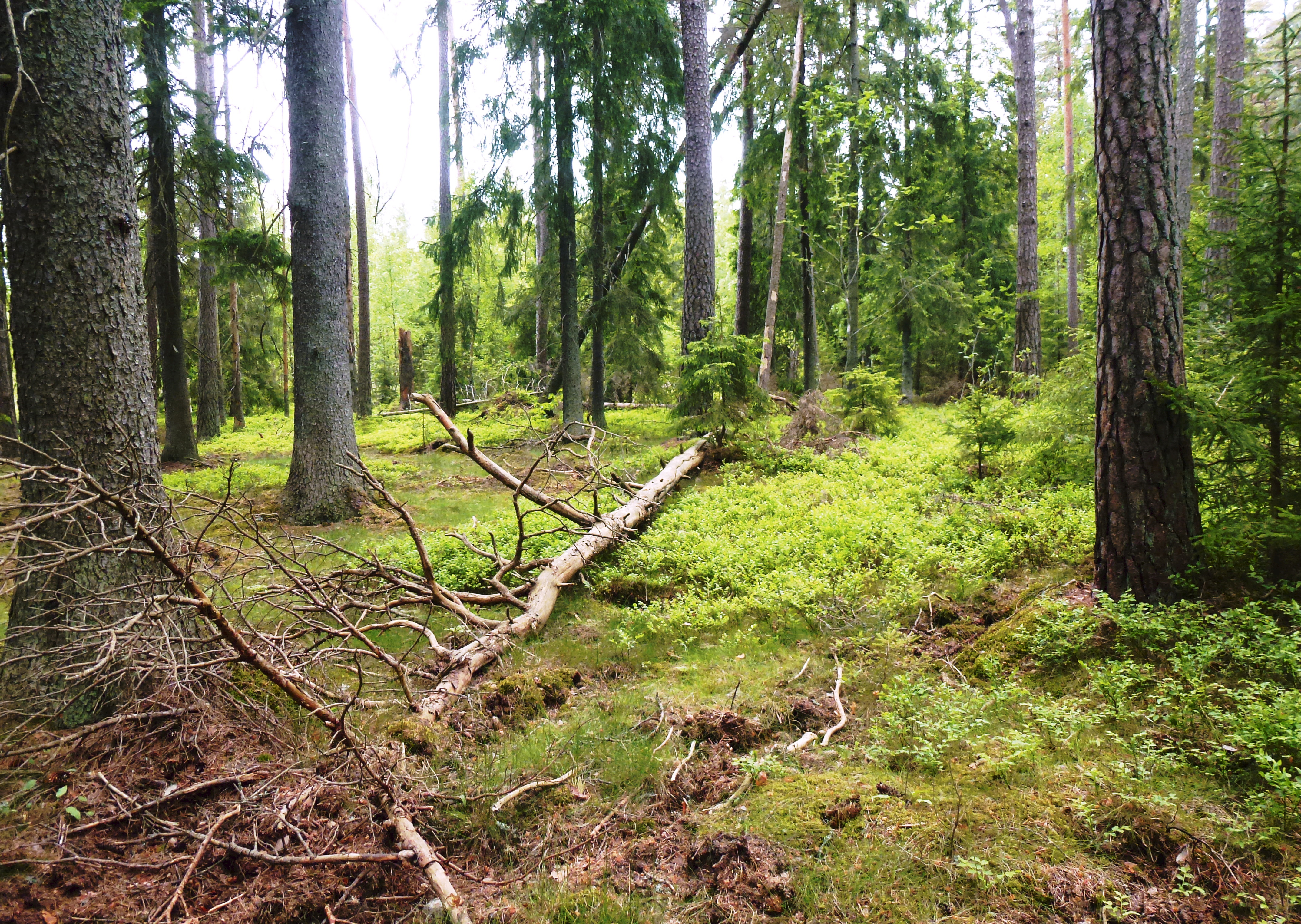 Östra Bröta naturreservat (norra del)